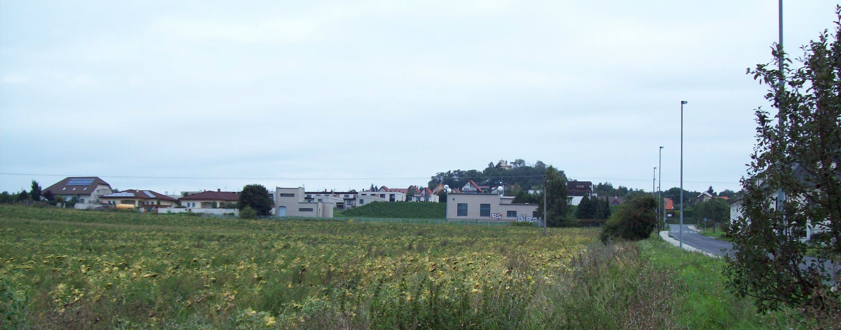 Pohled na Chloumek z Chloumecké ulice. Vyvýšenina je čedičový suk Chloumeček (283 m n. m.).